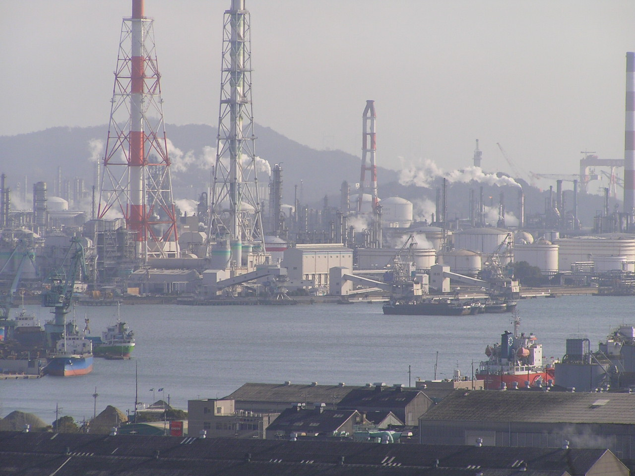 kurashiki city mizushima industrial area